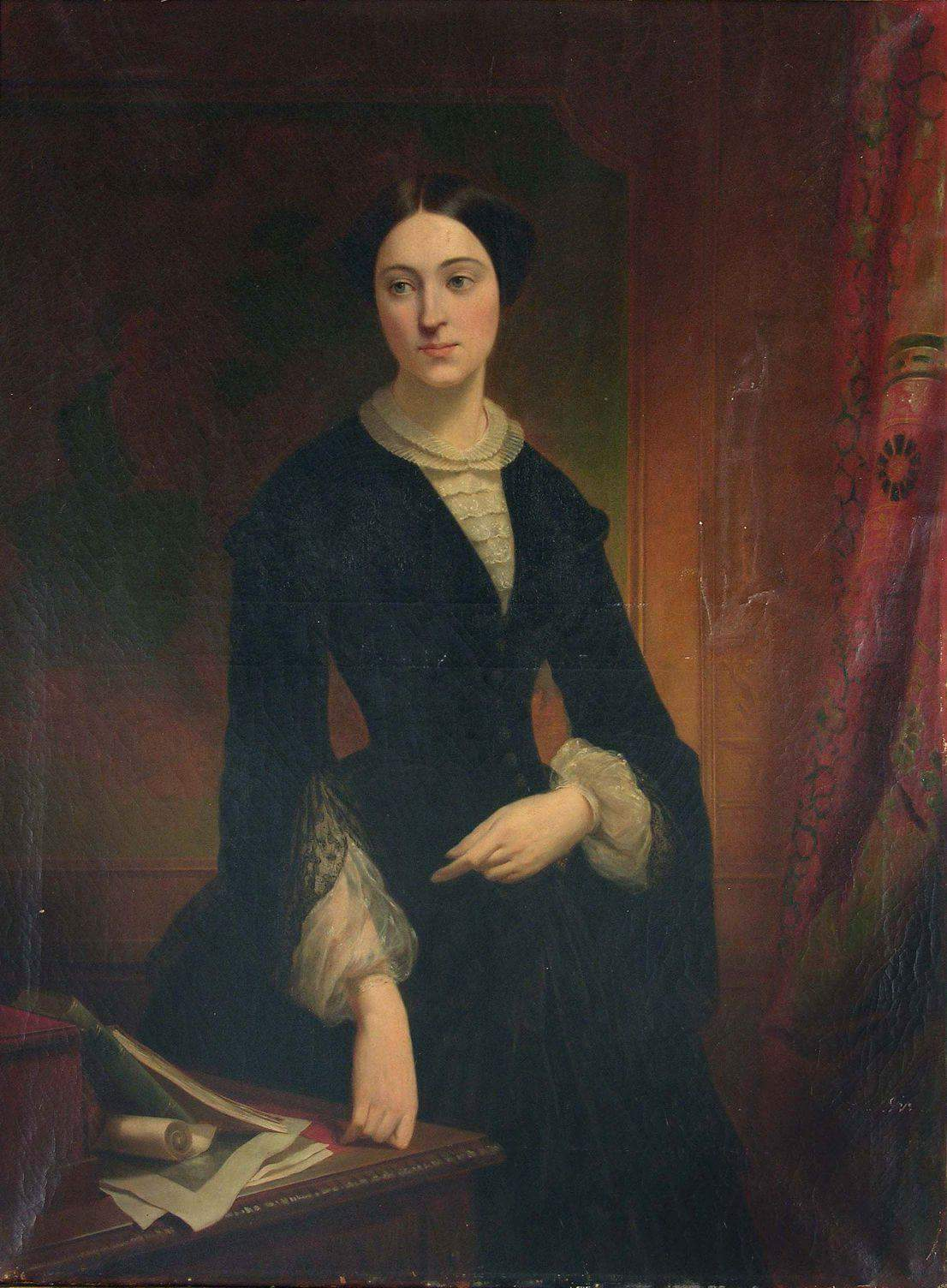 Portret Izabelli z Czartoryskich Działyńskiej